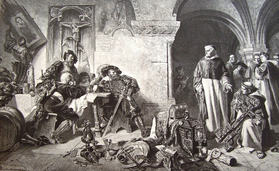 Brandschatzung eines Klosters durch Landsknechte, 1876